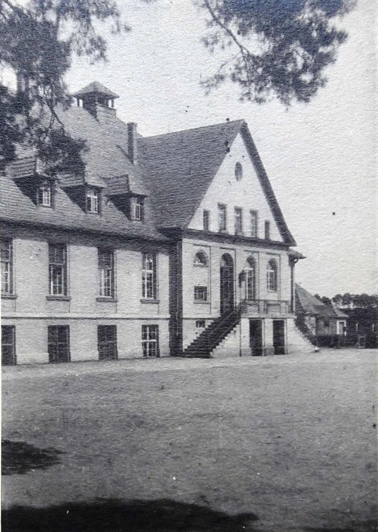 Szkoła Podchorążych dla Podoficerów w Bydgoszczy - budynek kasyna oficerskiego.